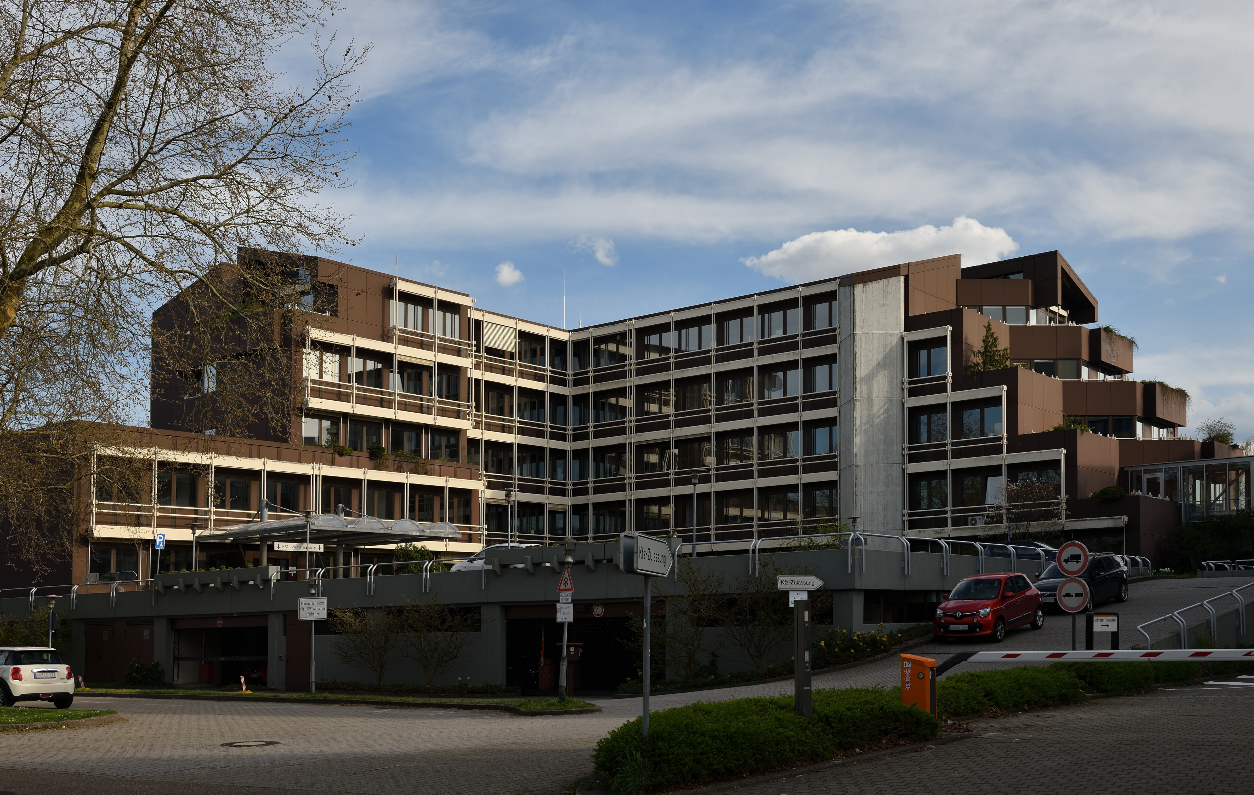 Offenburg: Landratsamt